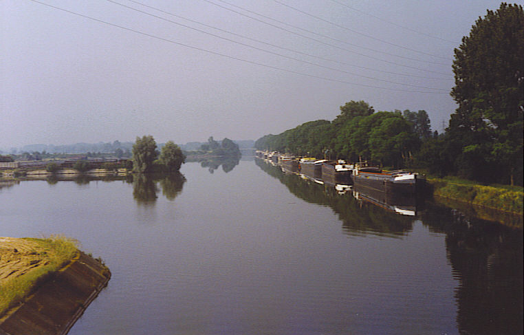 Zuid-Willemsvaart aprop de Rekem.